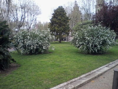 San Jose, Uruguay